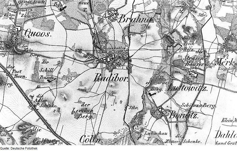 Original image description from the Deutsche Fotothek Radibor. Oberreit, Sect. Bautzen, 1844/46